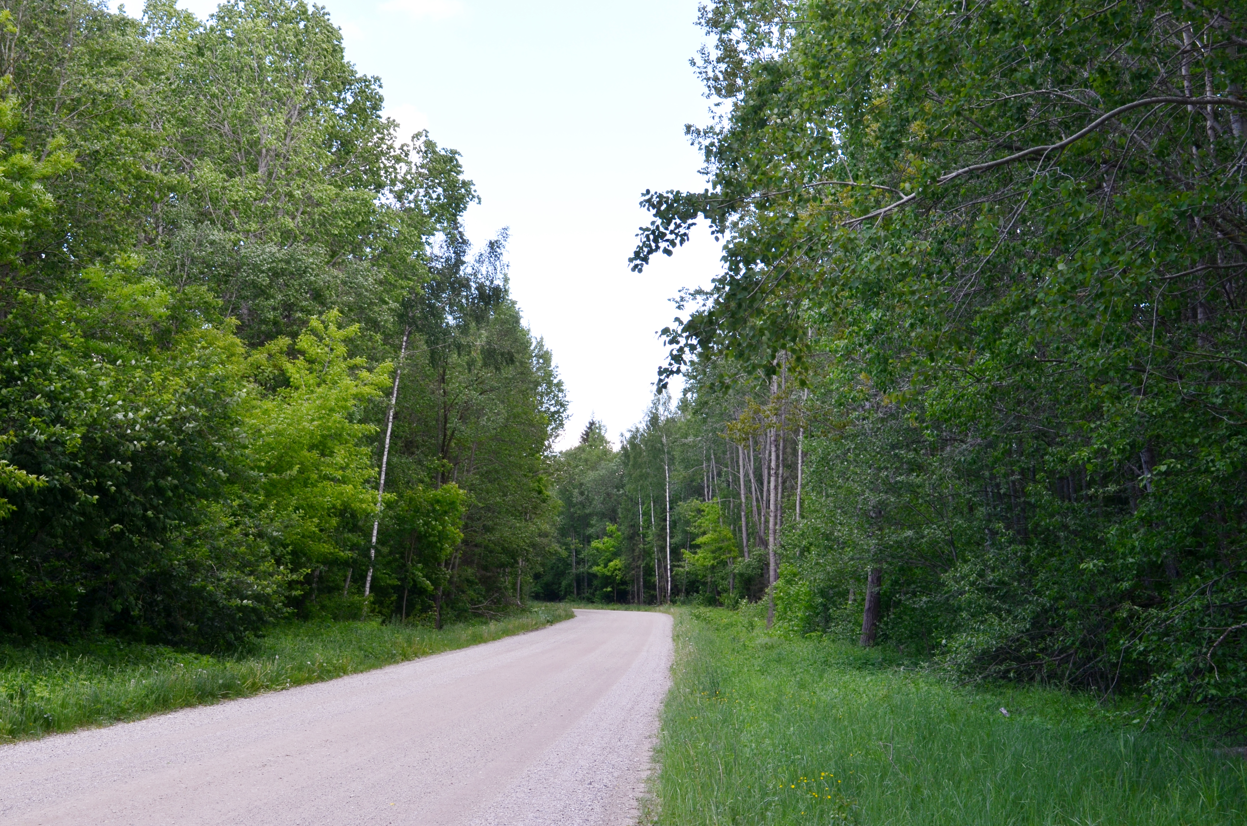 Raguvos-Aluočių miško dalis netoli Šilų, Panevėžio raj.